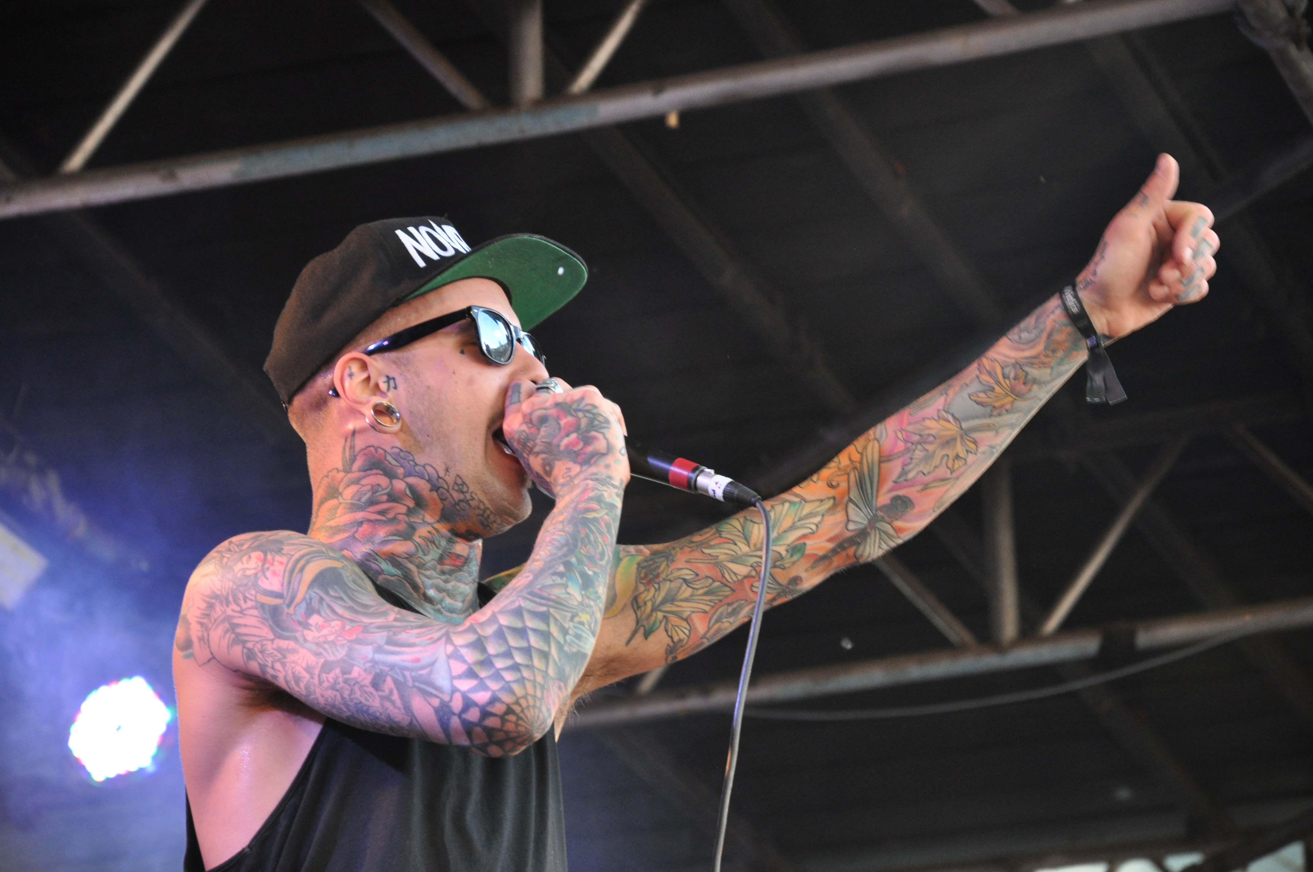 Betraying the Martyrs auf der Open-Air-Bühne beim Summerblast Festival 2014